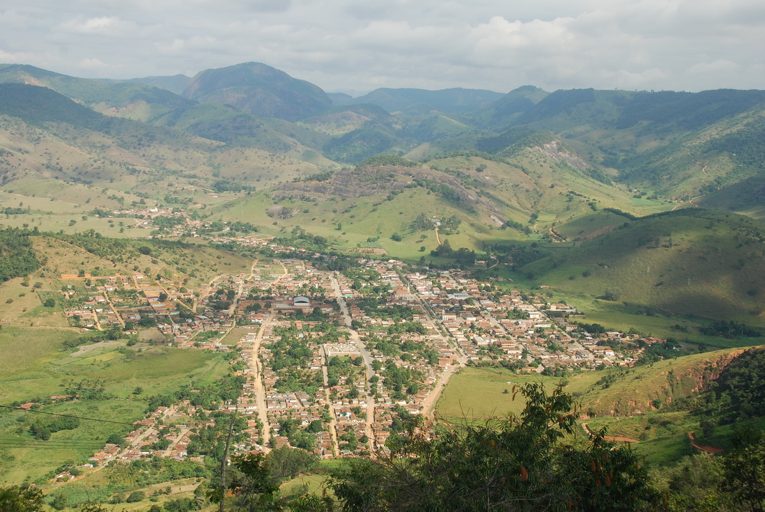 Vista de Pocrane - MG